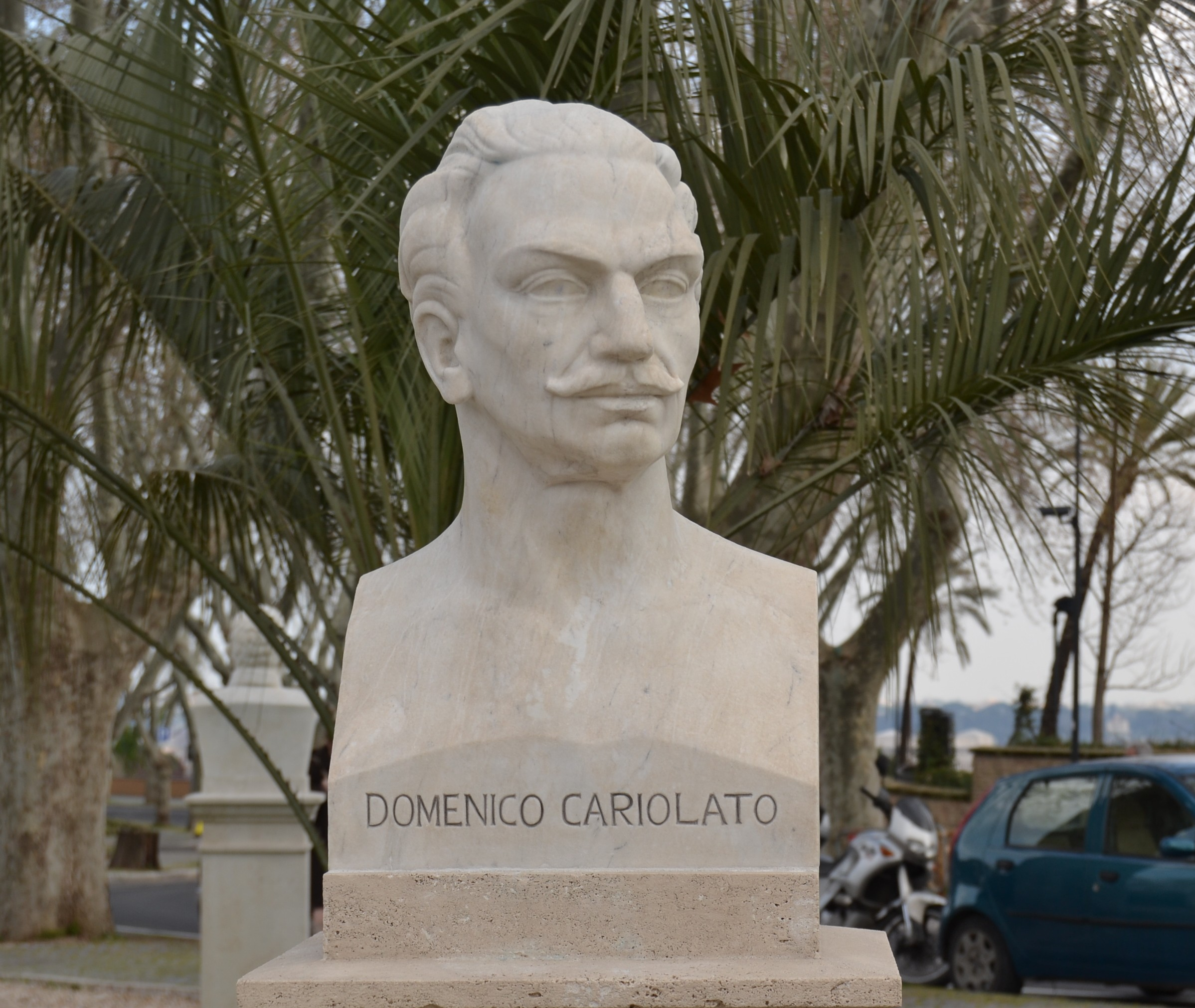 Busto restaurato di Domenico Cariolato